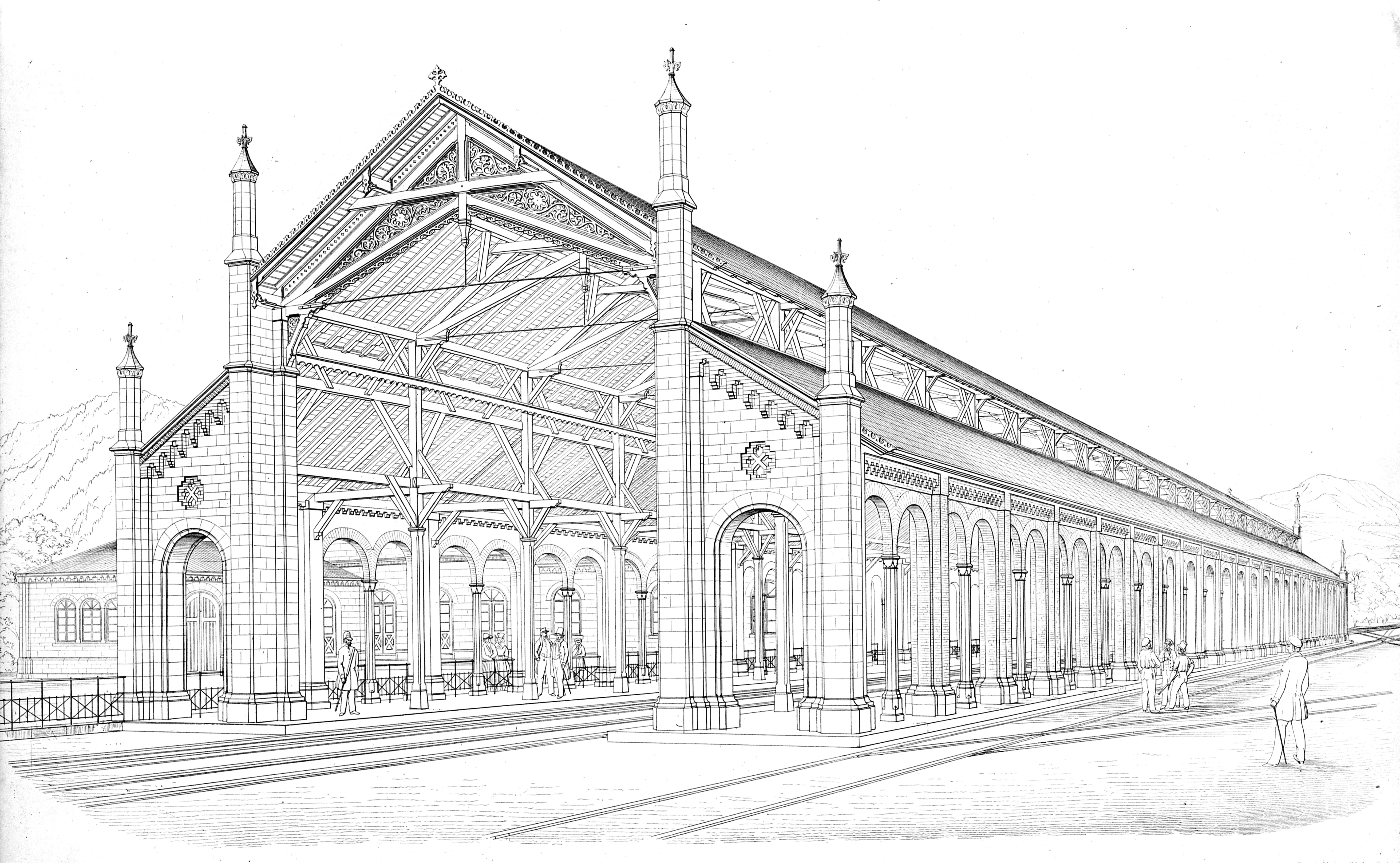 Bahnsteighalle des Bahnhofs in Freiburg (Breisgau)